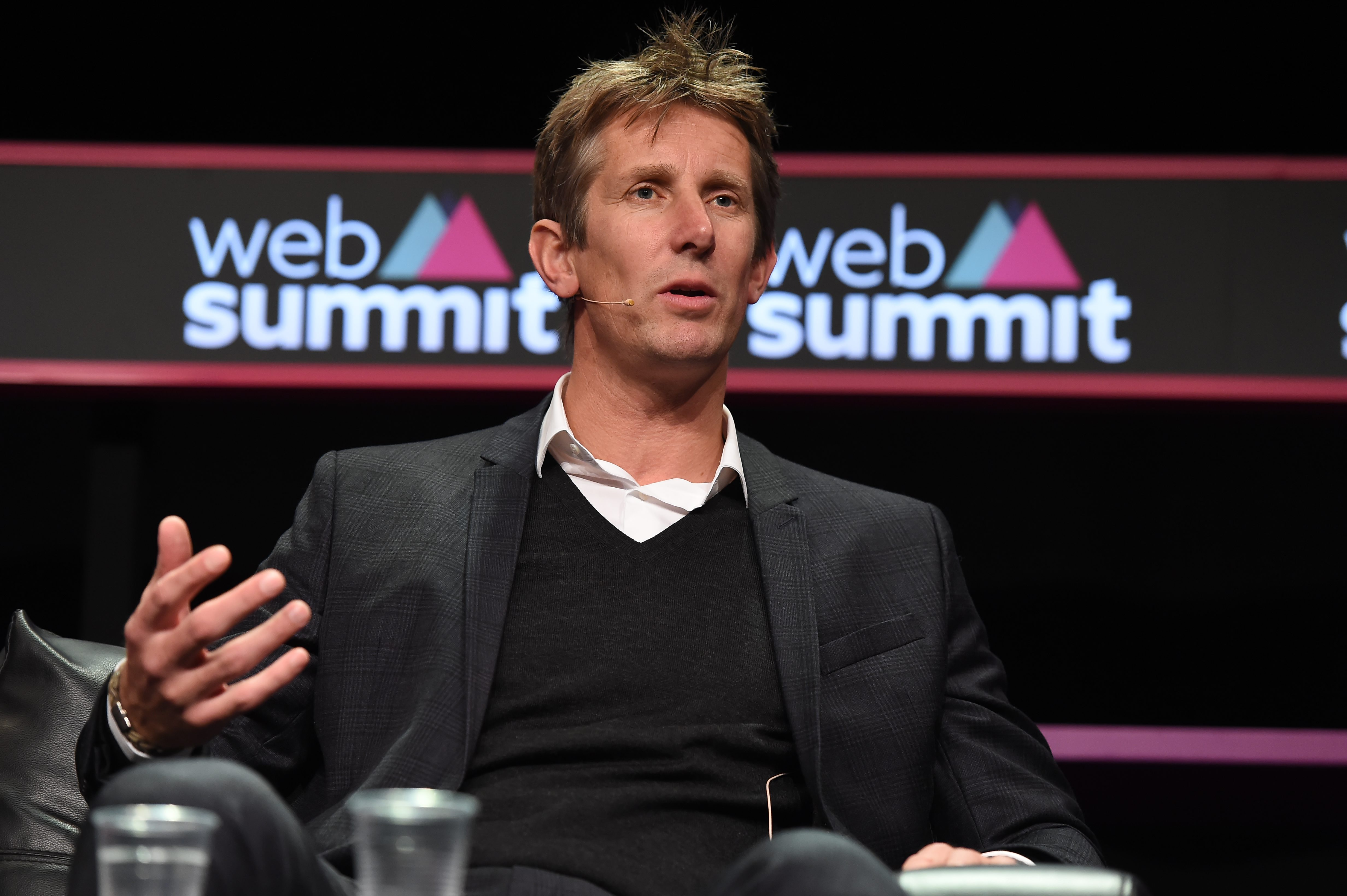 Sportsfile (Web Summit)